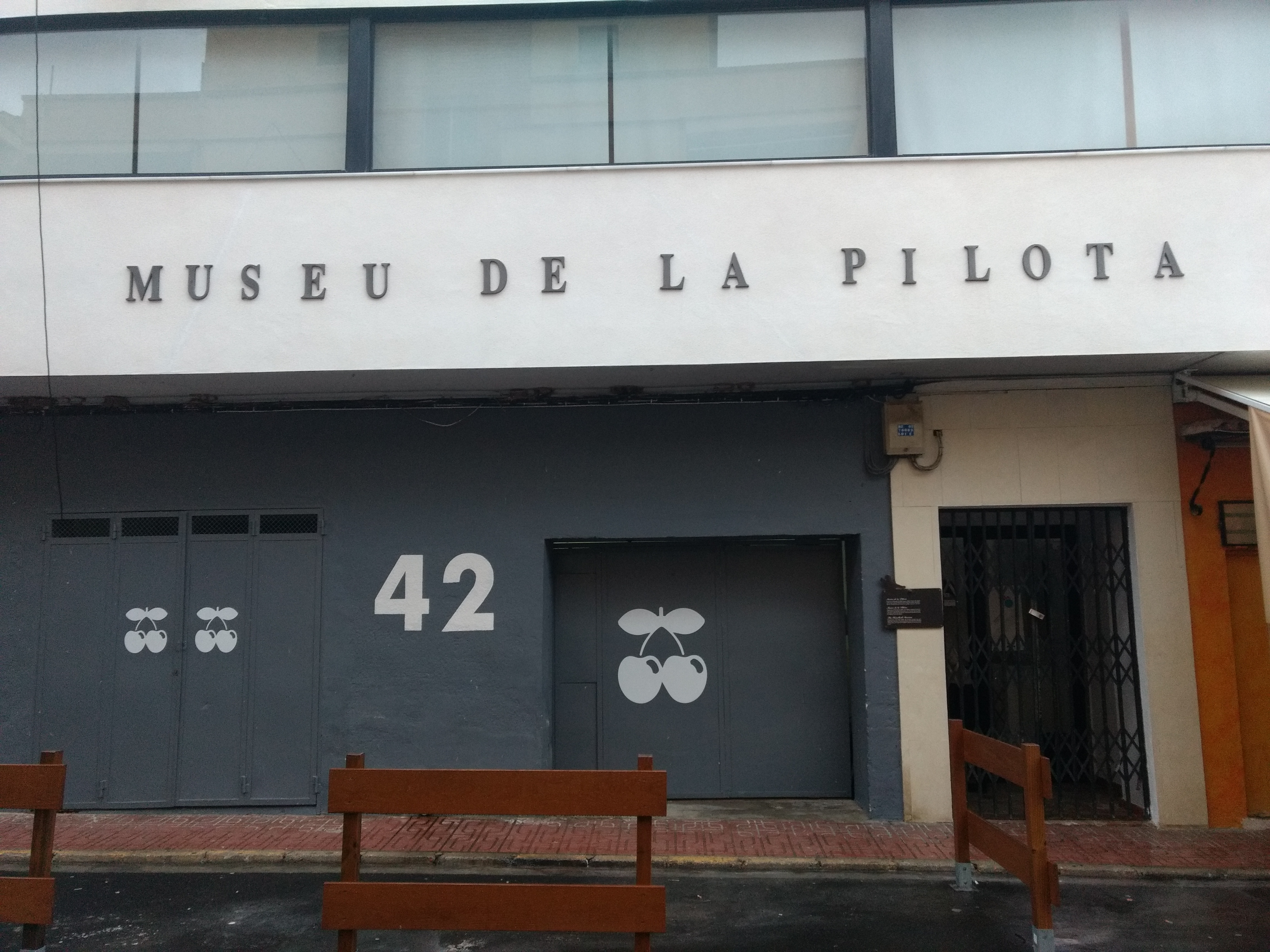 Façana del Museu del Genovés, junt al Trinquet.